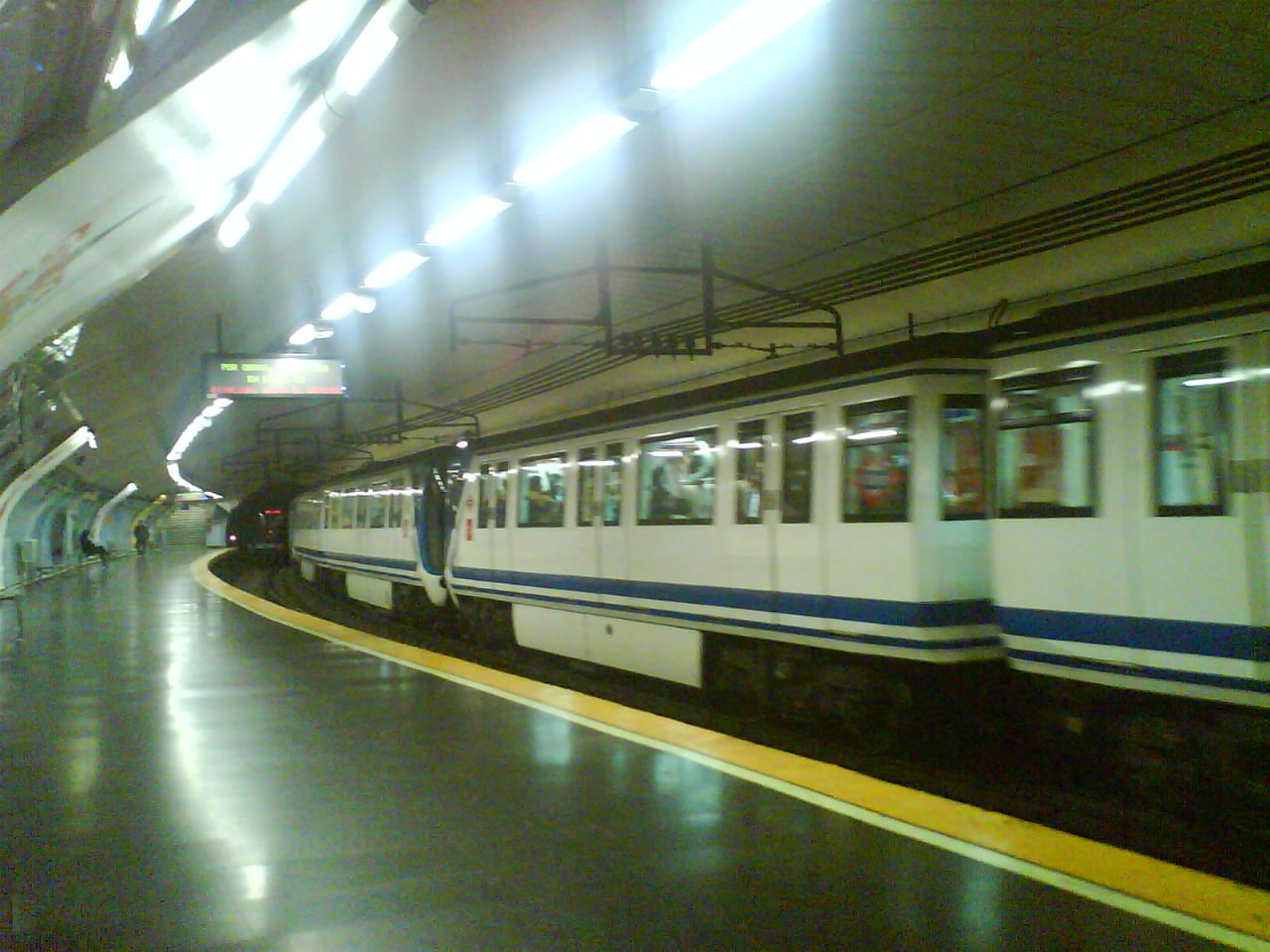 Foto de la estación de Metro de Quintana, una de las pocas que están construidas en curva